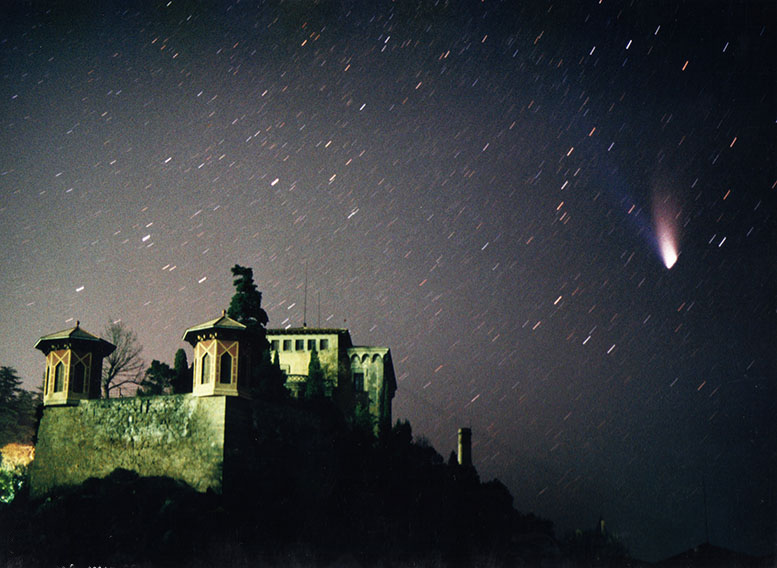 Pas del Cometa Hale Boop - Torre de Cal Pons